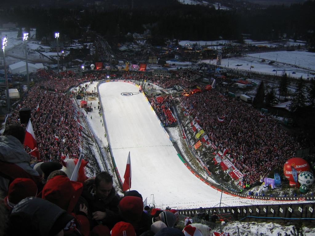 Wielka Krokiew in Zakopane.